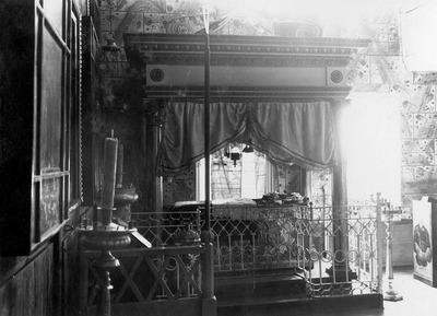 Рака с мощами прп. Варнавы Ветлужского в Никольской ц. Варнавиной пуст. Фотография. 1908 г.